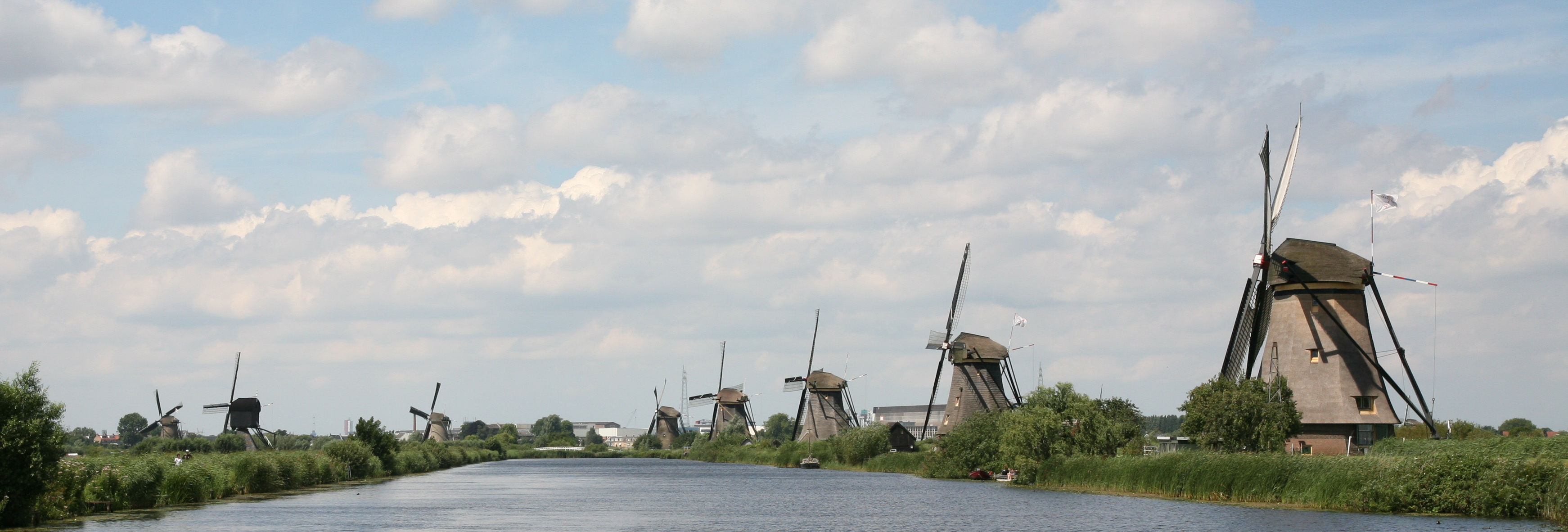 KINDERDIJK